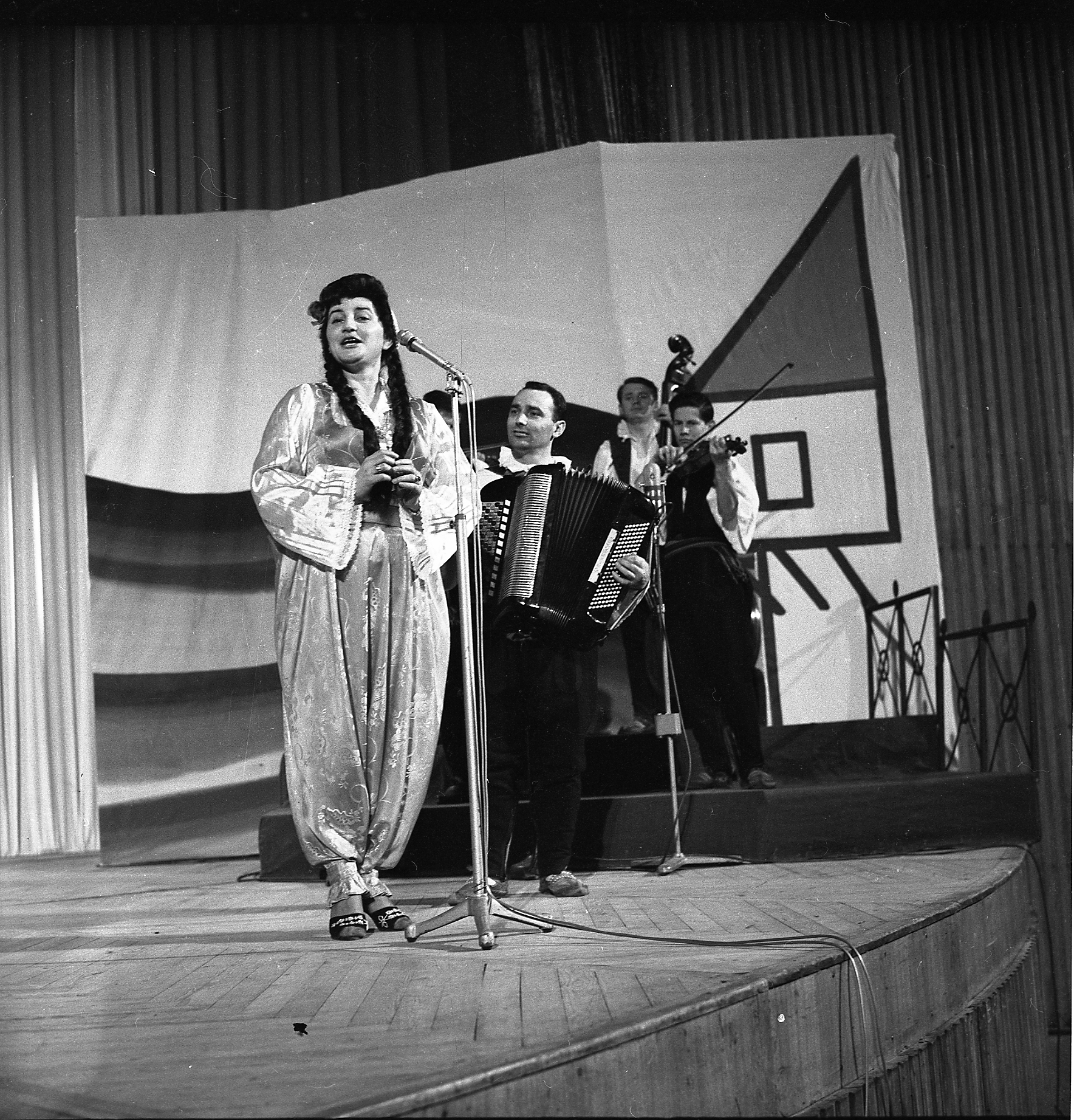 Nada Mamula, Tv emisija Sjelo na vrelu Bosne, 1962. Foto:Stevan Kragujević (po odobrenju kćerke Tanje Kragujević)